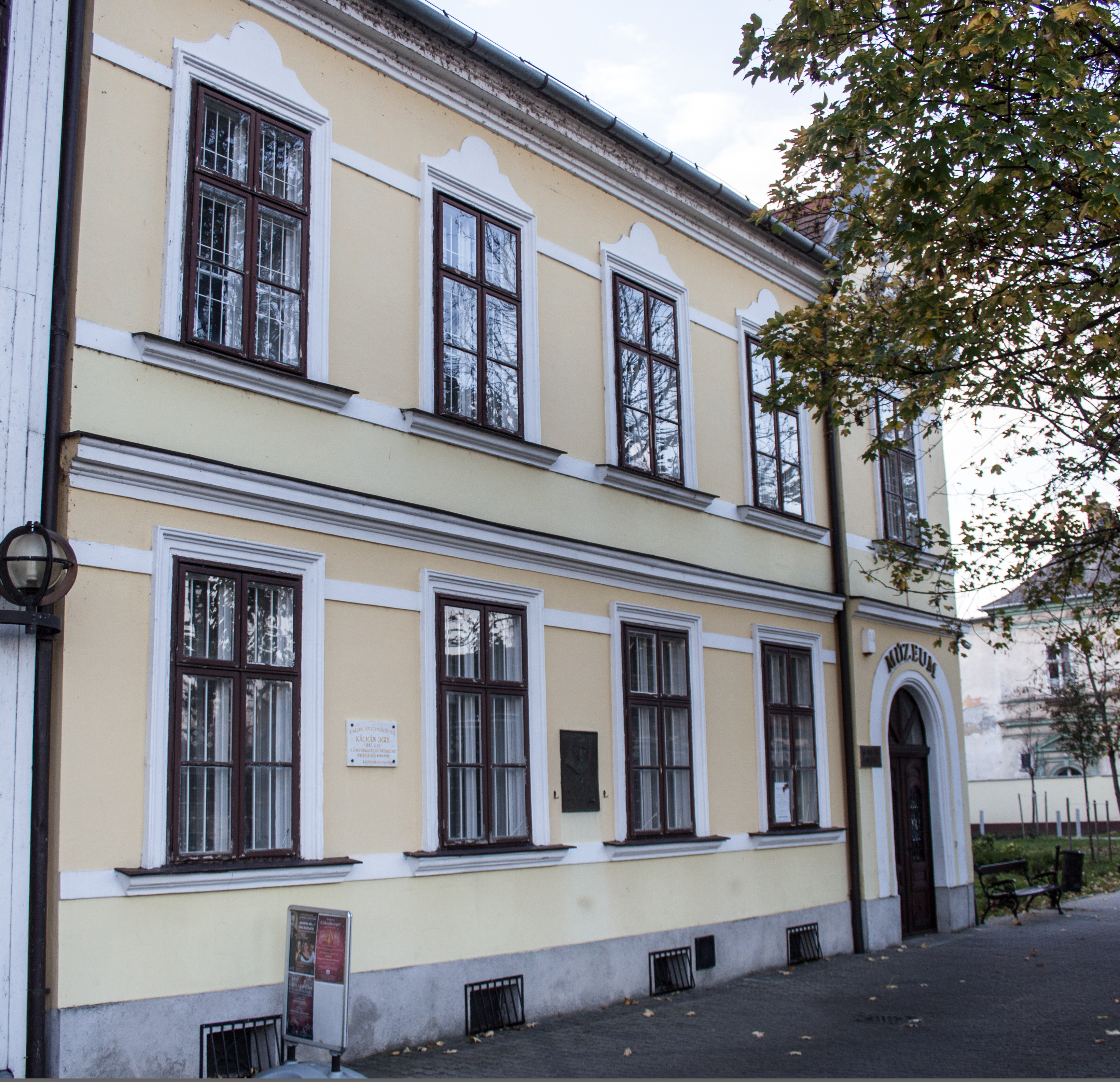 Building_of_the_Imre_Kálmán_museumlabel QS:Len,"Building_of_the_Imre_Kálmán_museum"label QS:Lhu,"Kálmán Imre szülőháza és múzeuma a siófoki Kálmán Imre sétányon"